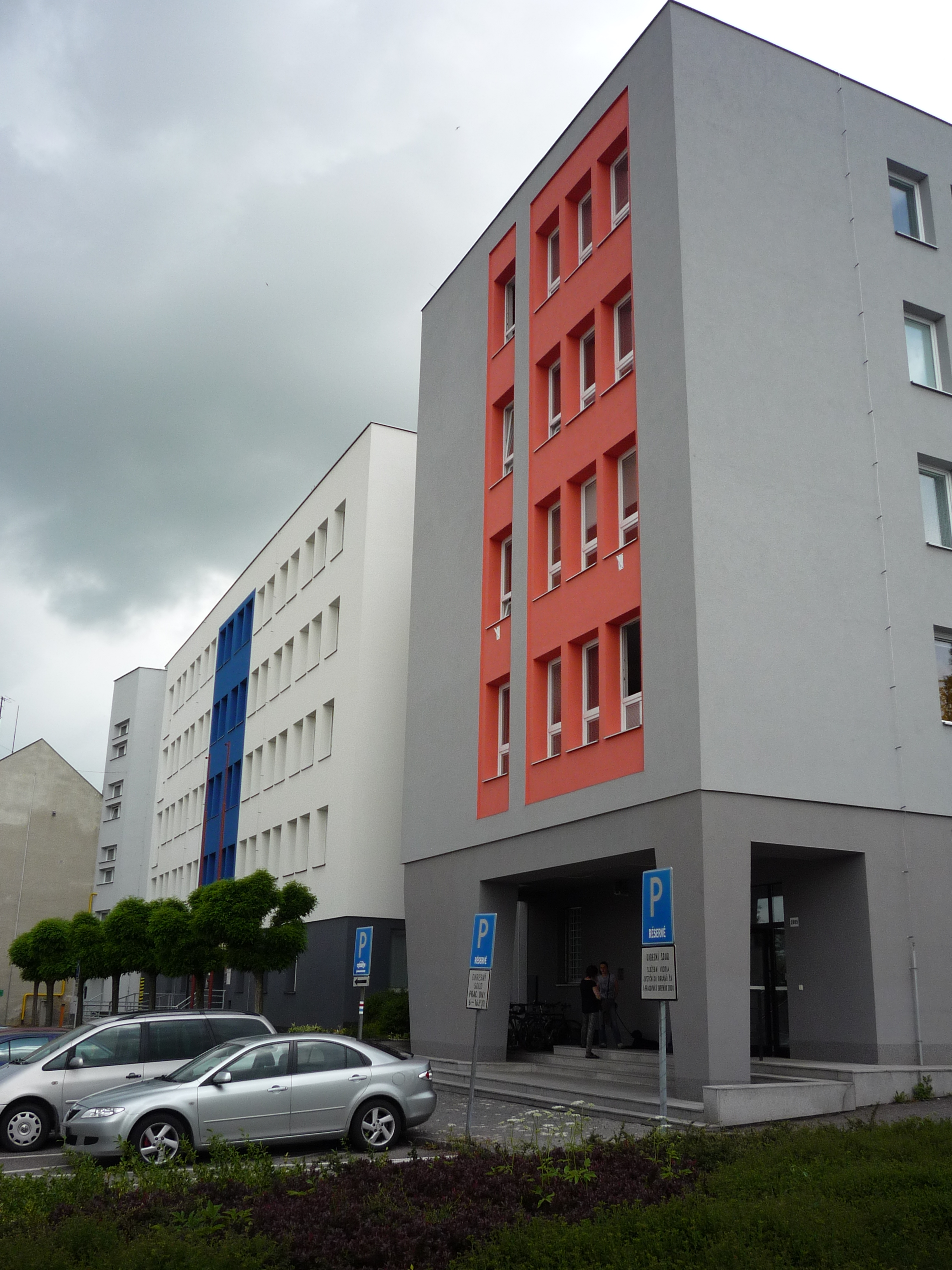 Autor fotografie Jiří Zelenka. Toulky Vysočinou. Ulice Dobrovského. Havlíčkův Brod.